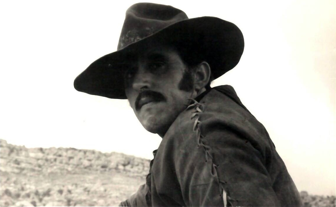 José terron